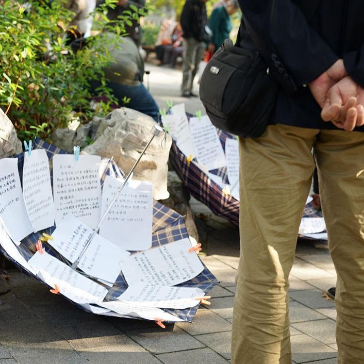 中国的嫁・婿の探し方。プロフィール書いた紙を傘に貼って、親同士でマッチングするらしい。 #上海旅行記 #魯迅公園